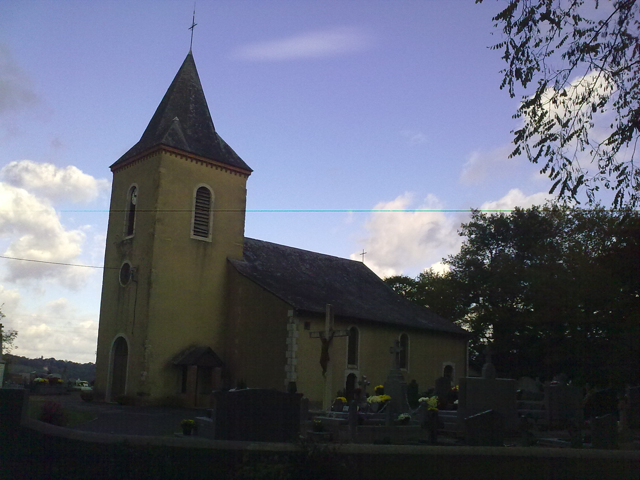 Hagetaubin